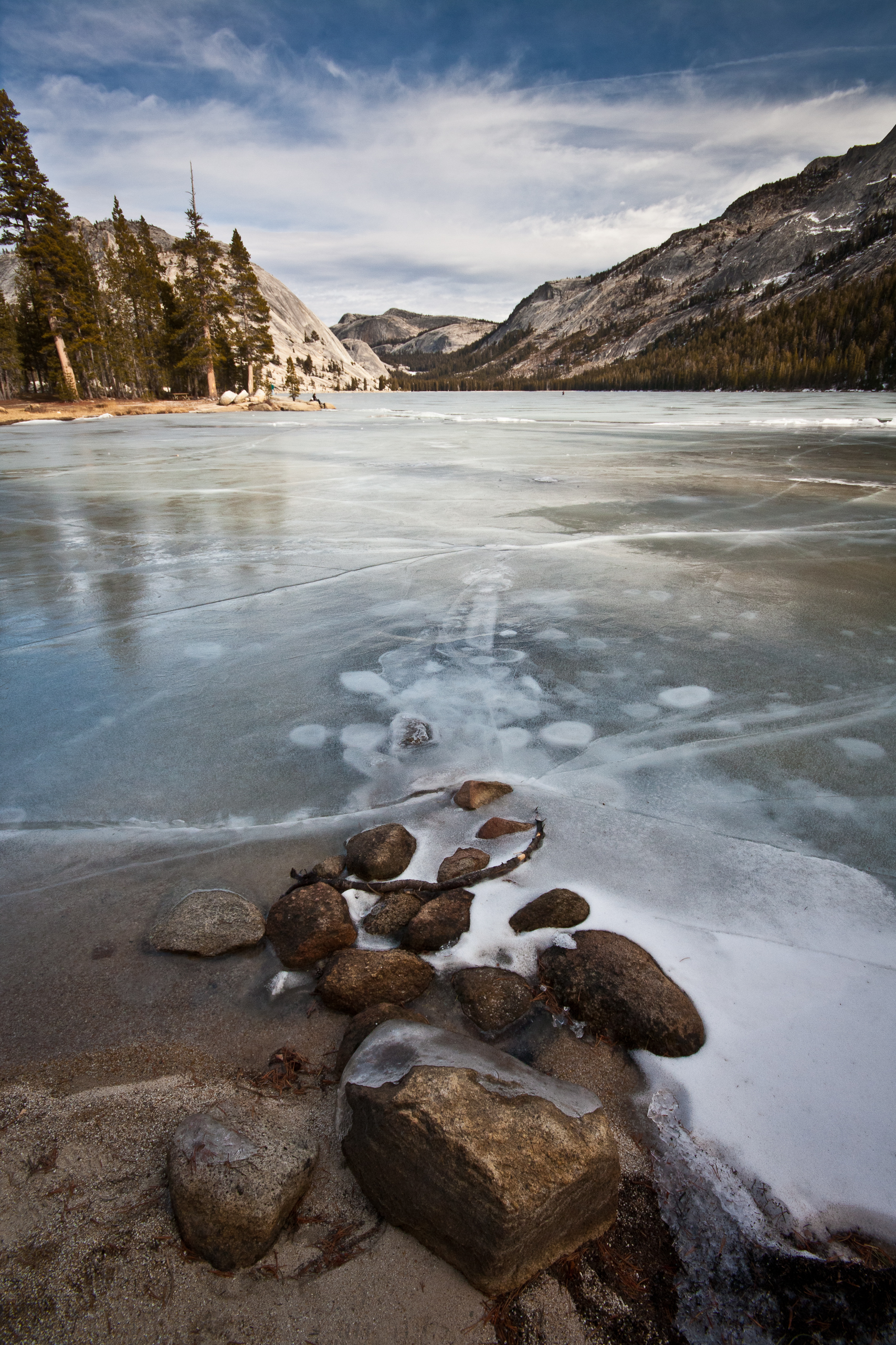 Tenaya Lake, Yosemite National Park, CA.